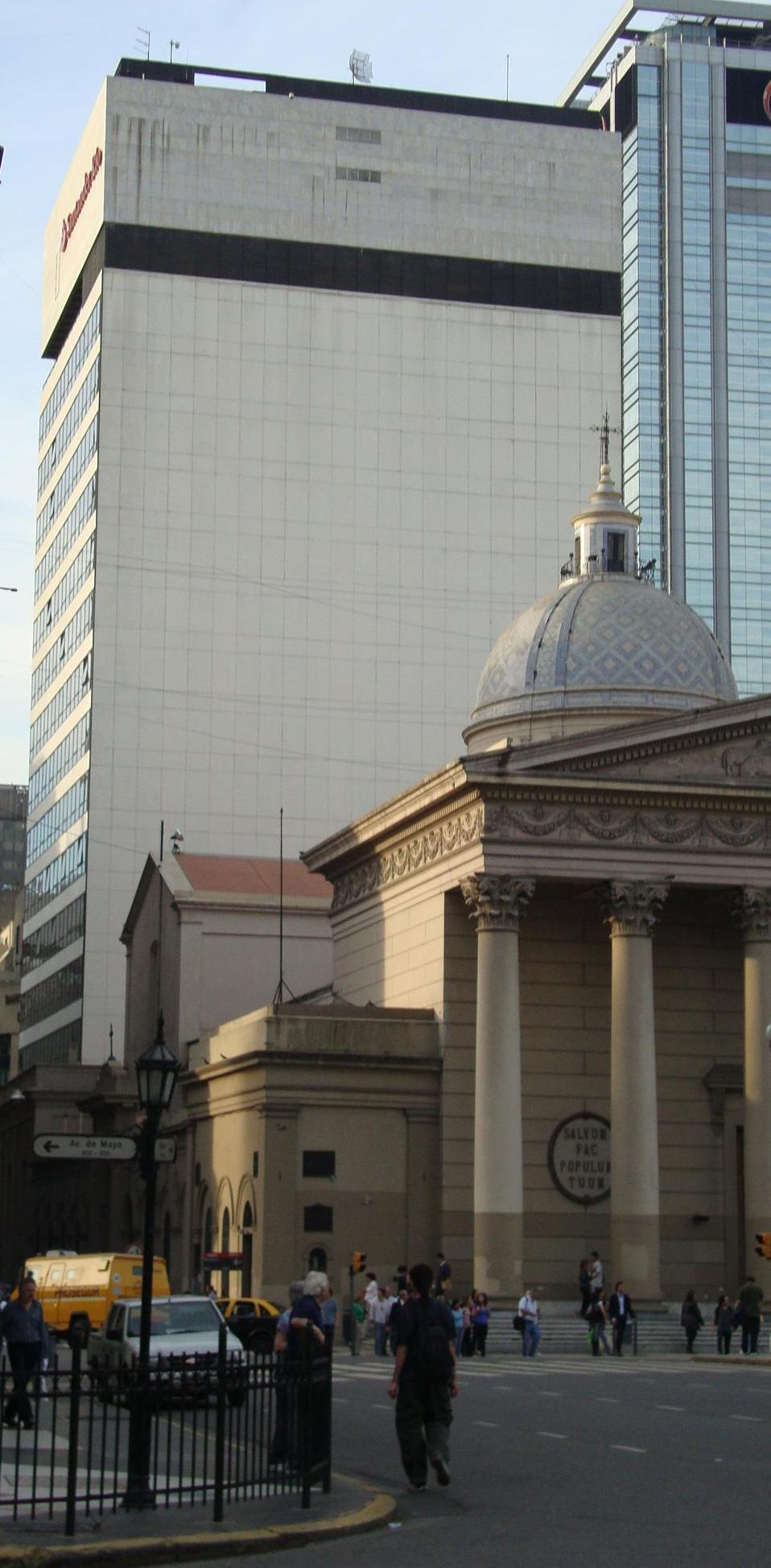 El Edificio Banco Río (hoy Santander Río) del estudio de arquitectos Mario Roberto Álvarez, visto desde la Plaza de Mayo. Buenos Aires, Argentina.